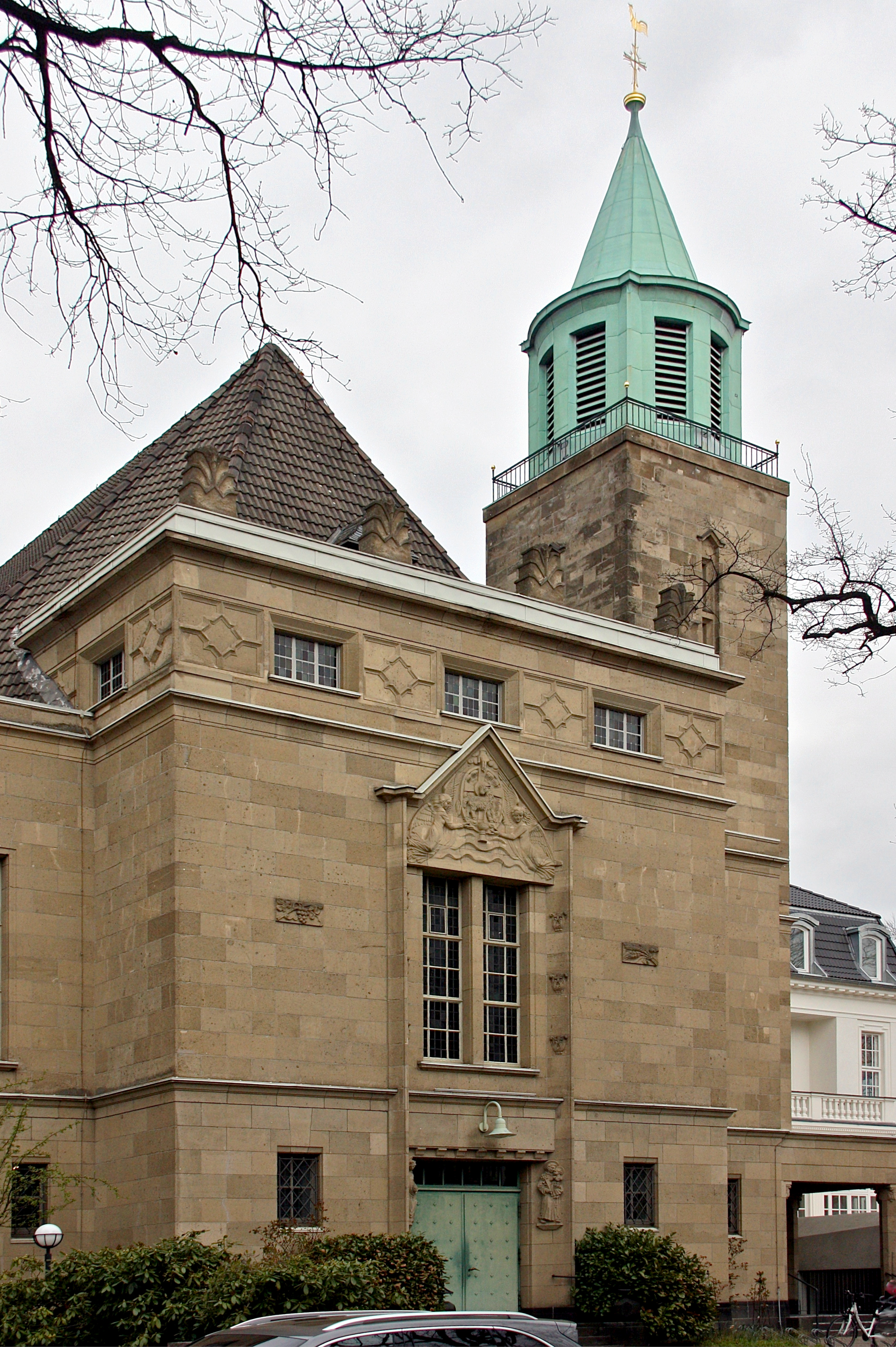 Hamburg, Harvestehude, Katholische Kirche St. Elisabeth This is a photograph of an architectural monument.